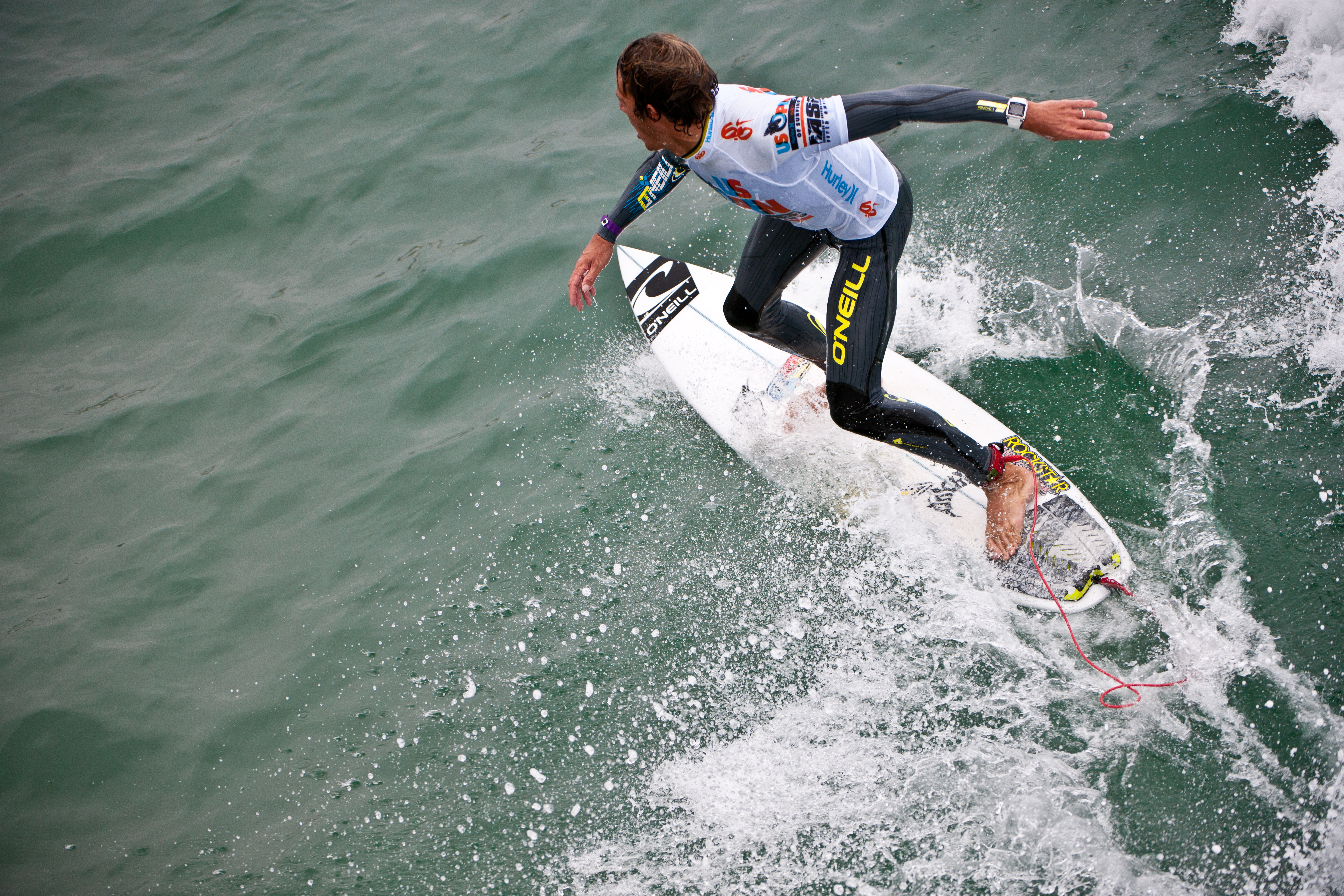 Nikon D3X